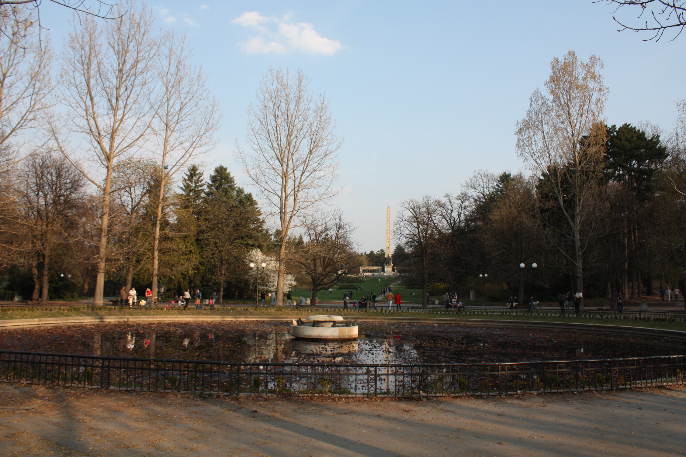 Borisova gradina, Борисова градина, Bulgaria